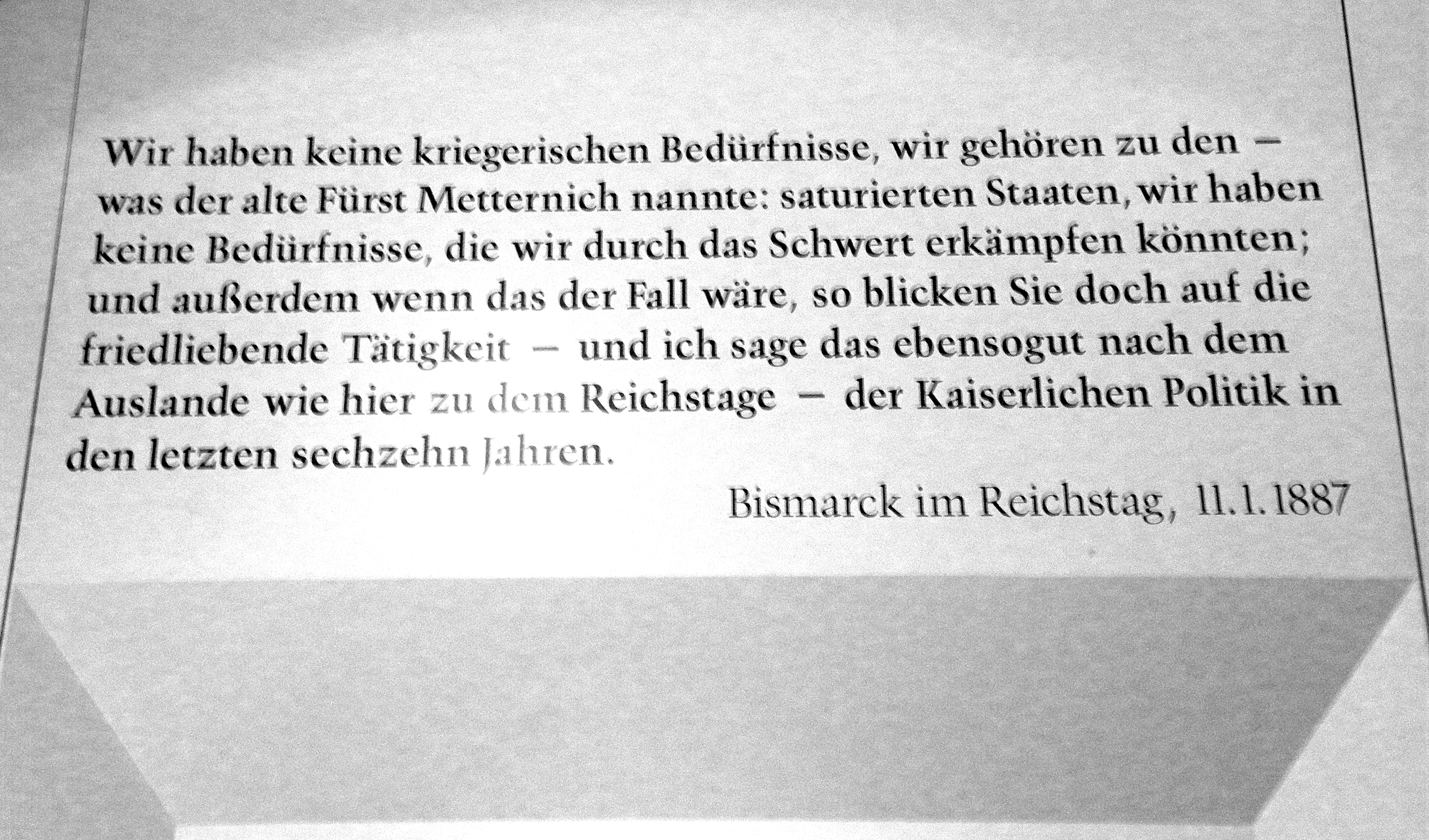 Кайзеровская политика при Бисмарке. Вводная цитата на стене современного баварского военного музея.Ингольштадт.